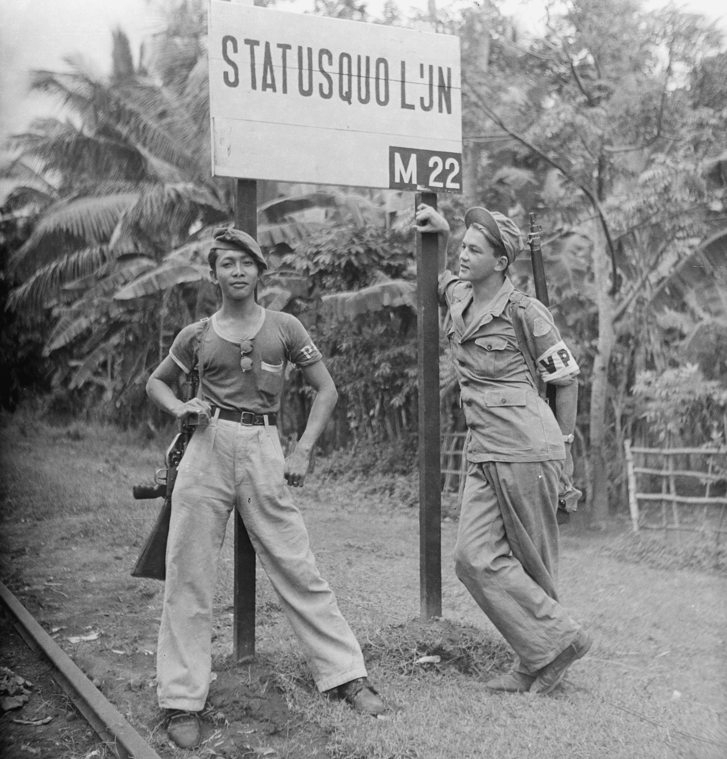 Collectie / Archief : Fotocollectie Dienst voor Legercontacten Indonesië Reportage / Serie : [DLC] Prowoelan nabij Modjokerto status-quo lijn Beschrijving : [een Nederlandse en Indonesische TNI? militair onder het bord van de Status Quo lijn.] Annotatie : DjK (de Indonesische militair is bewapend met een een tommy-gun) Datum : 12 februari 1948 Locatie : Indonesië, Nederlands-Indië Fotograaf : Fotograaf Onbekend / DLC Auteursrechthebbende : Nationaal Archief Materiaalsoort : Negatief (zwart/wit) Nummer archiefinventaris : bekijk toegang 2.24.04.03 Bestanddeelnummer : 12941